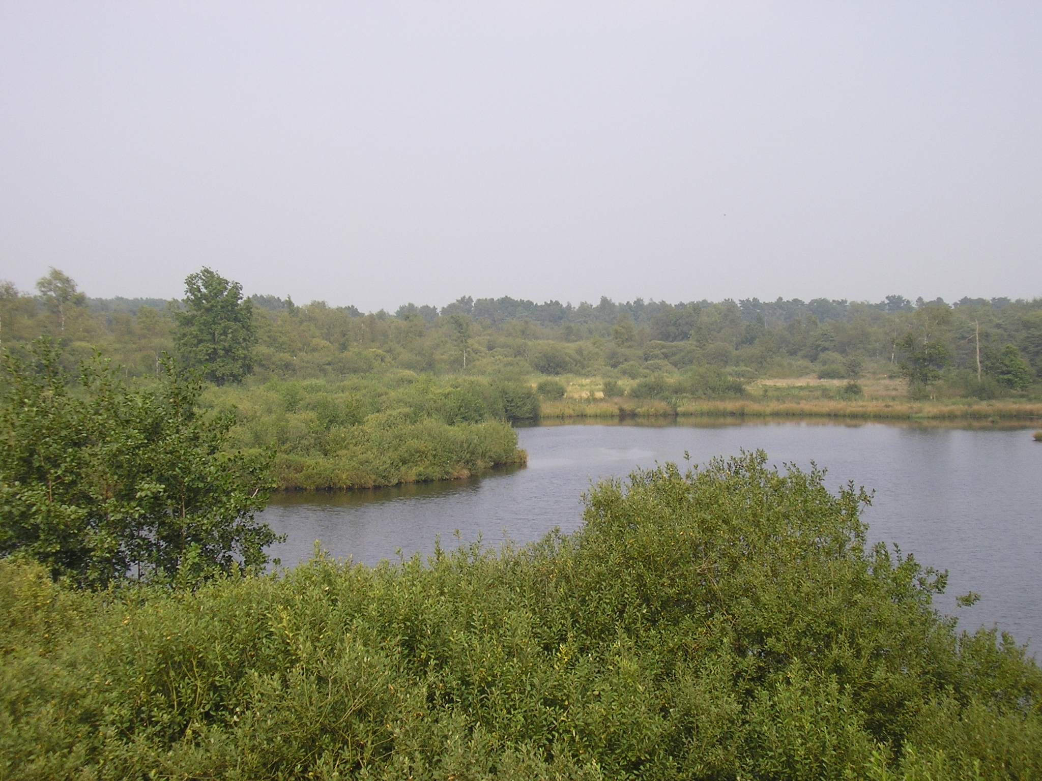 Een foto van natuurdomein de Liereman in Oud-Turnhout. Het is 'n foto die ikzelf gemaakt heb.